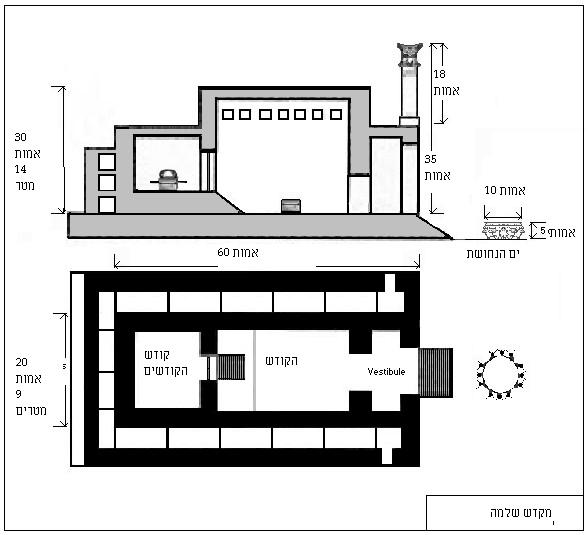 תרגום שלי של קובץ מויקי באנגלית (שברישיון GNU) רישיון נוצר במקור על ידי ותורגם על ידי משתמש:Deroravi